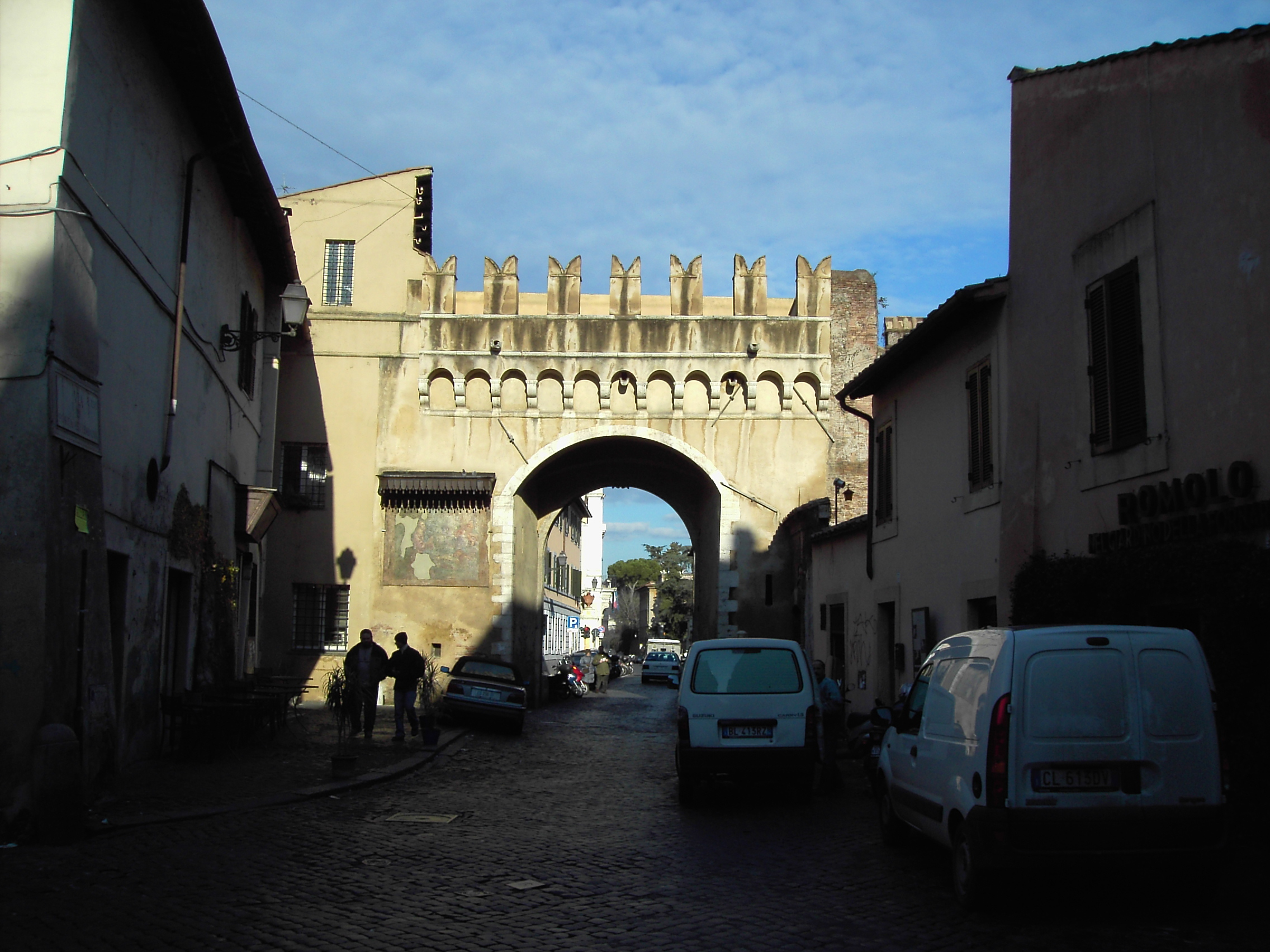 Roma, Trastevere: porta Settimiana.